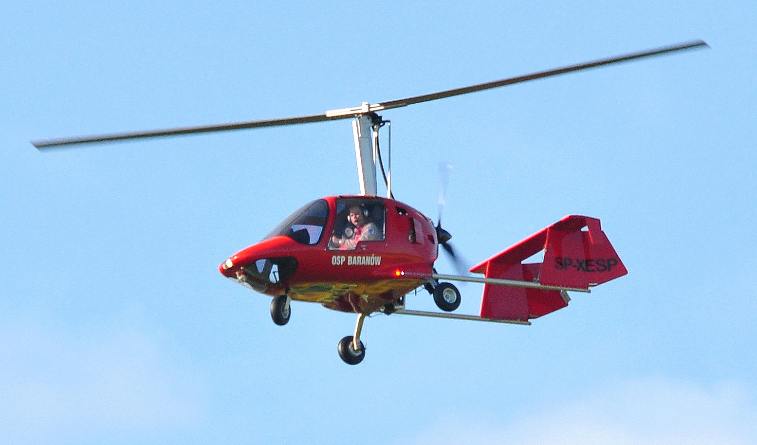 Wiatrakowiec ZEN 1 - XENON 2 w służbie Ochotniczej Straży Pożarnej w Baranowie w powiecie grodziskim